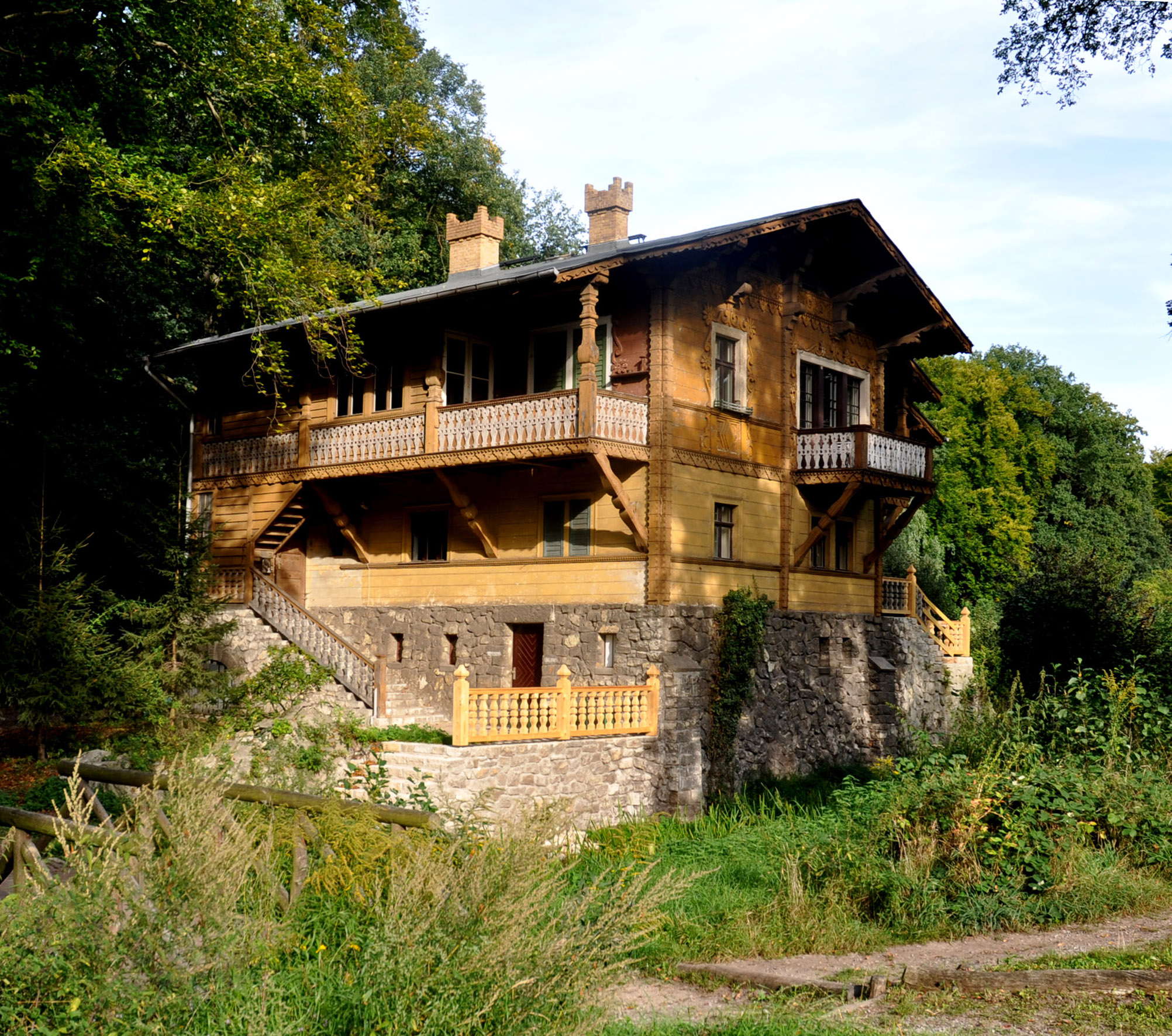 Schweizerhaus am Bäkekanal